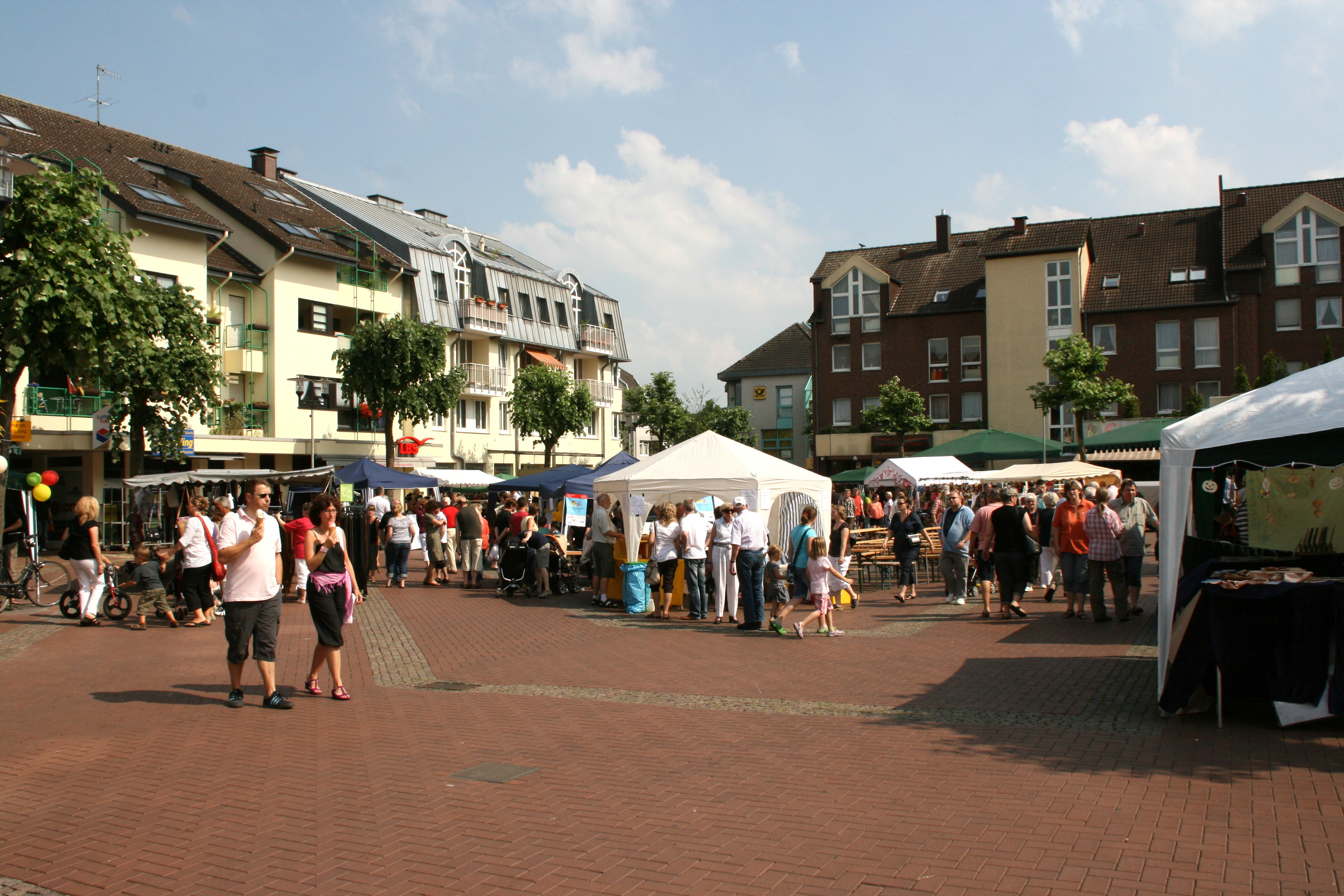 Entenrennen in Leichlingen